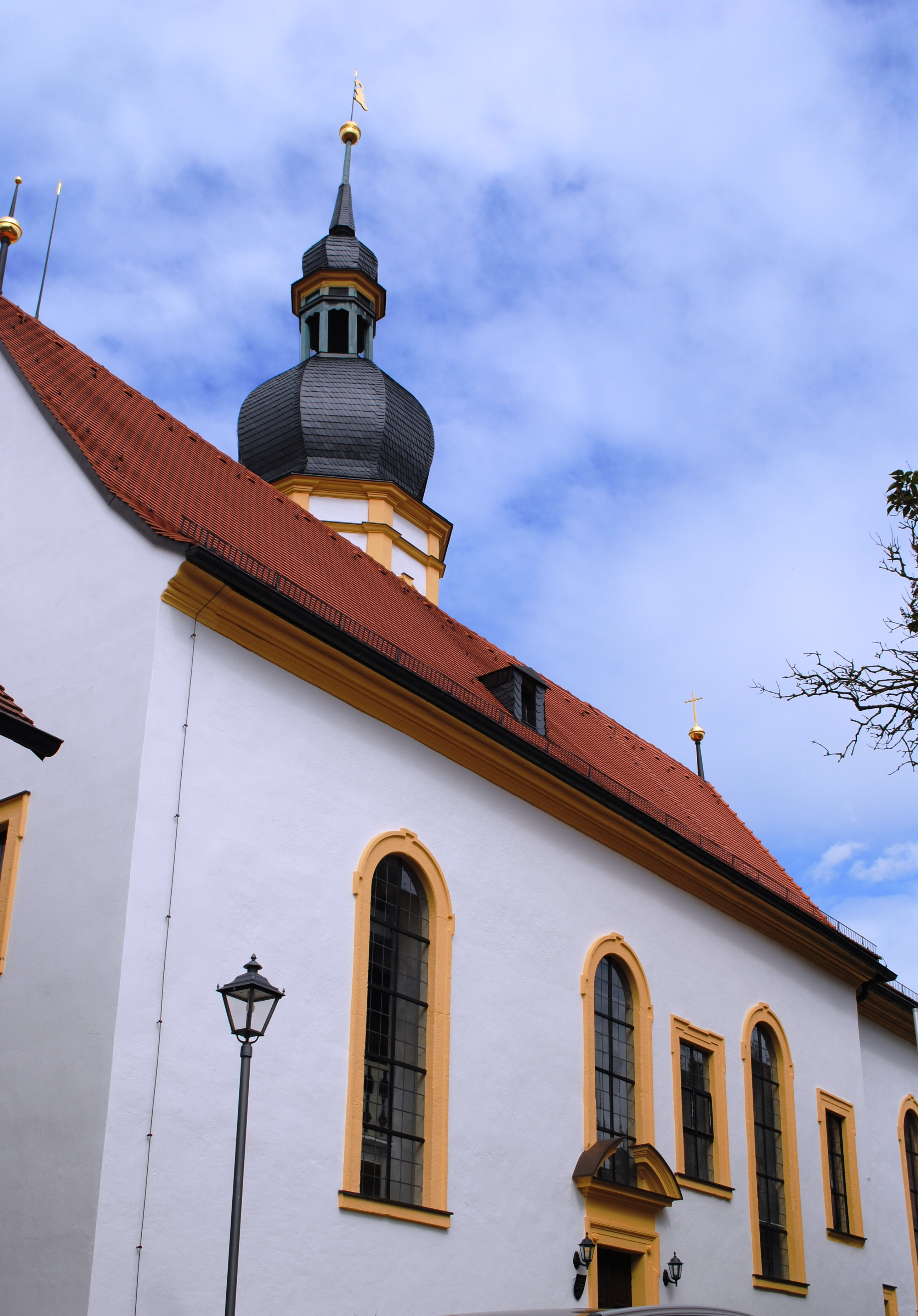 Kirche, Panorama, RüdenhausenThis is a photograph of an architectural monument.